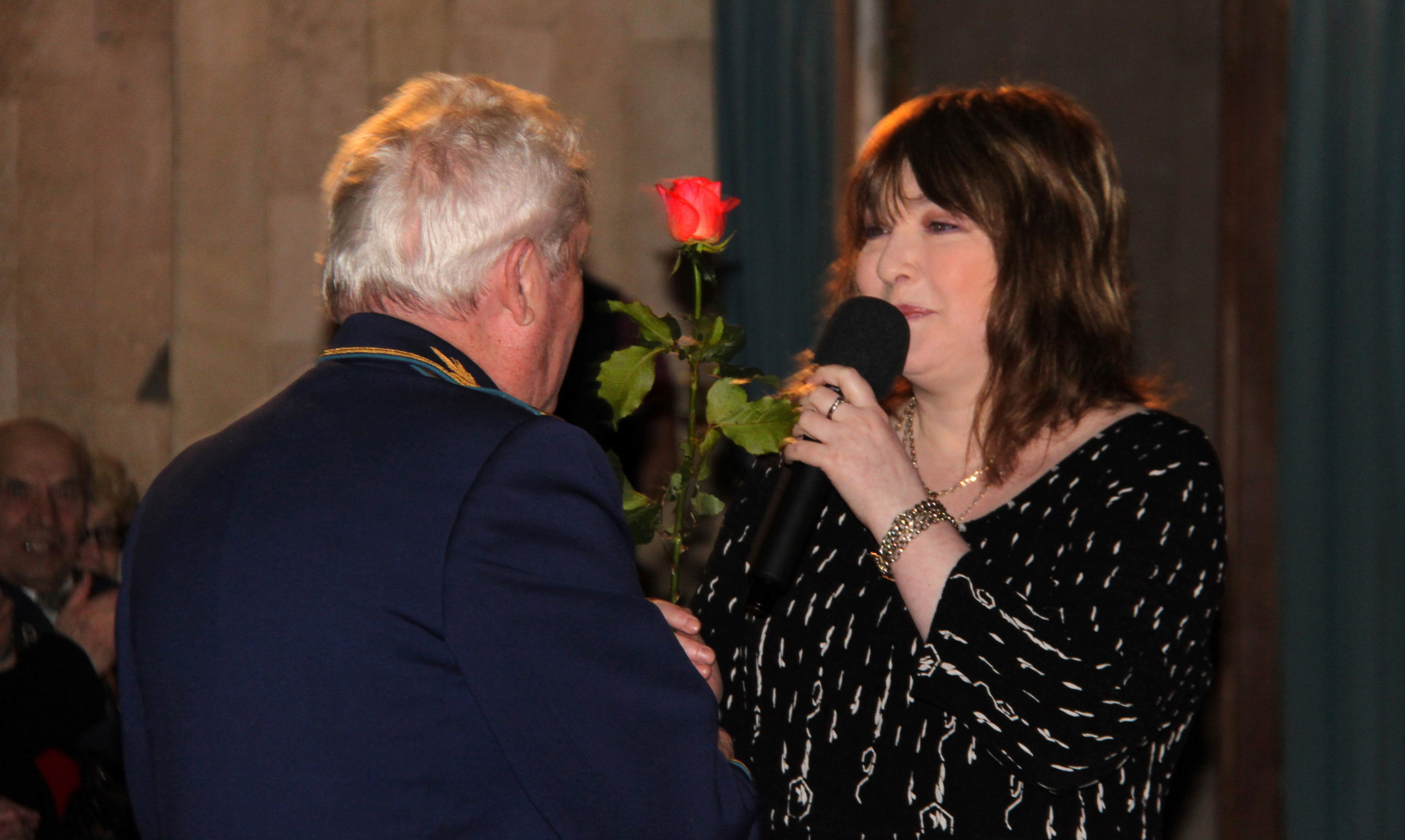 Певица и композитор Екатерина Семёнова